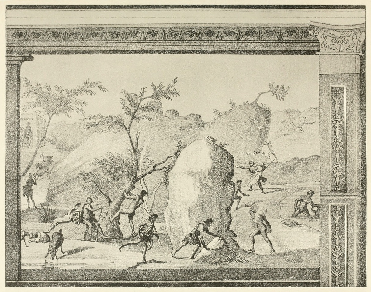 Das Abenteuer der Lästrygonen, homerisches Wandgemälde aus dem Esquilino in Rom